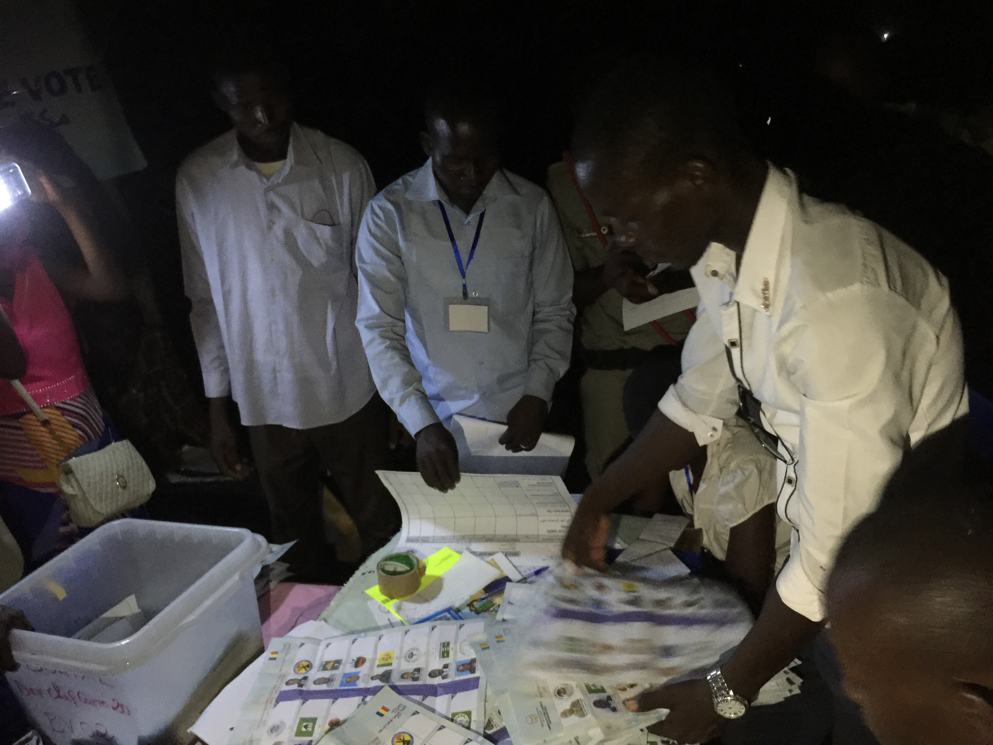 Session de dépouillement dans un bureau de vote à Boutal Bagar, un quartier périphérique de N'Djamena où des centaines de gens en colère n'ont pu voter par manque de bulletins de vote, 10 avril 2016, Tchad.